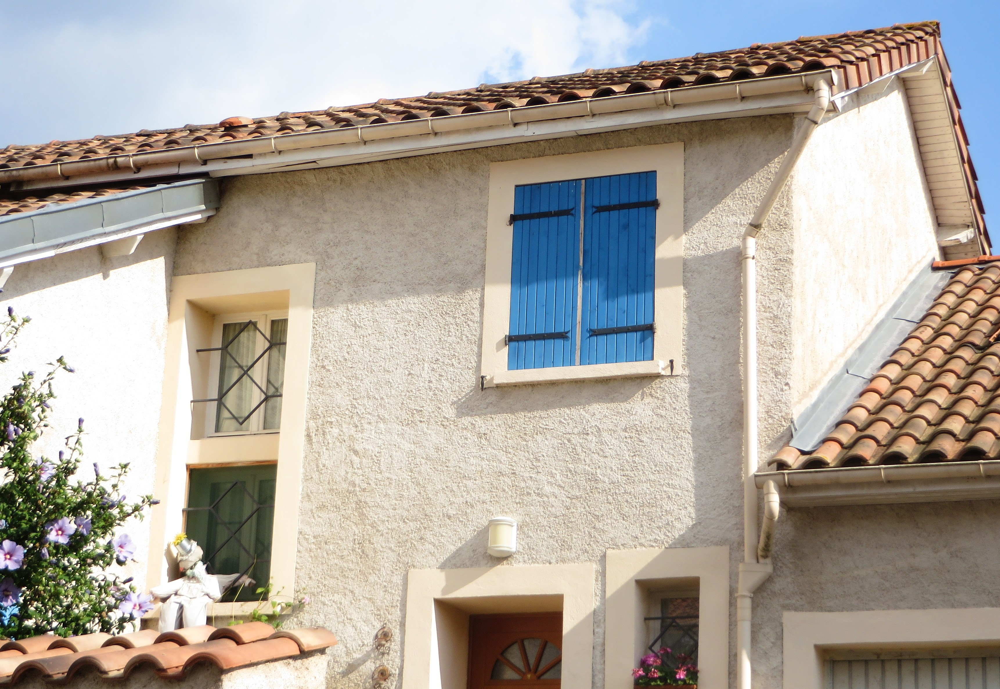 Liocourt synagogue